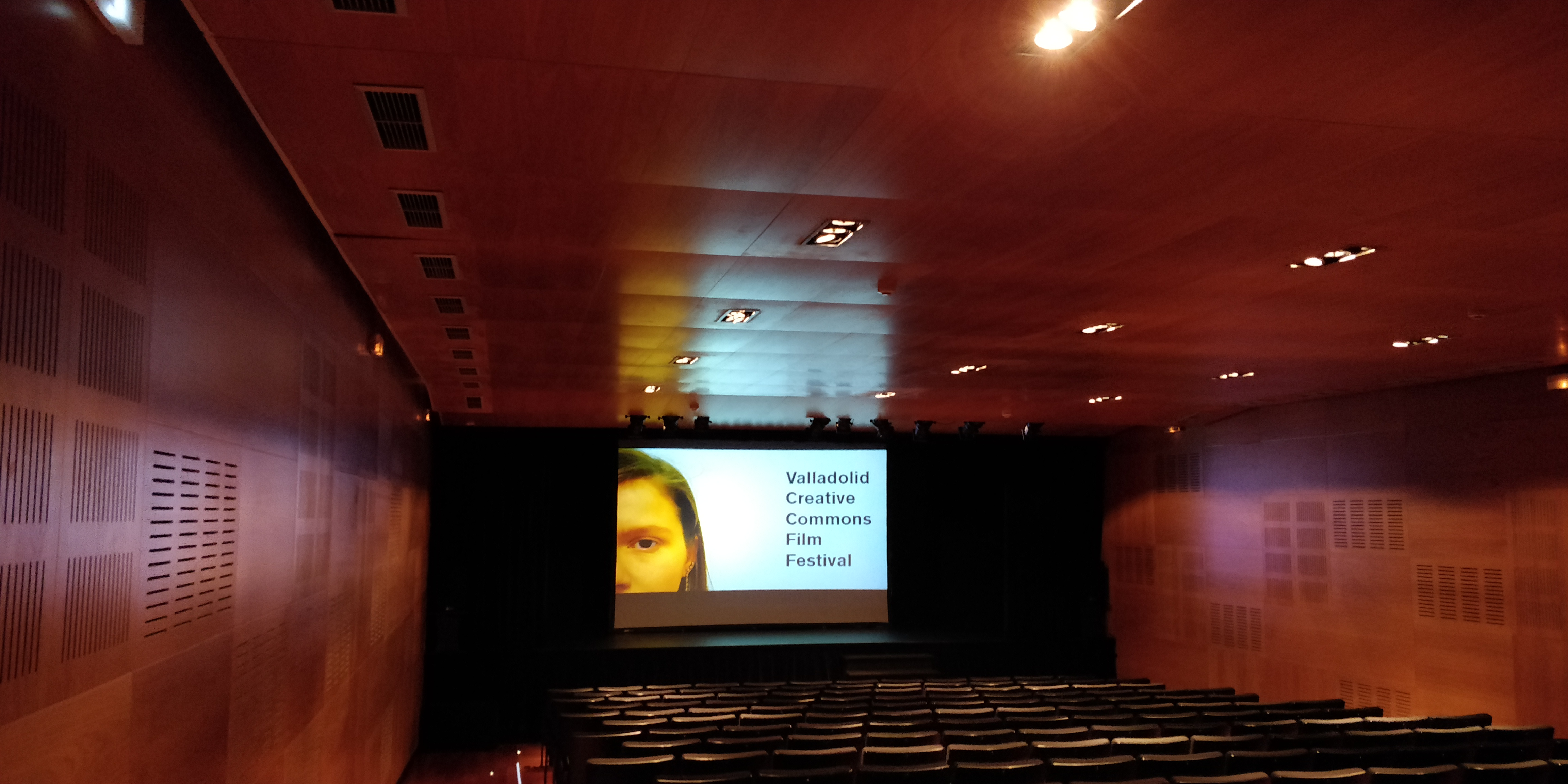 Fotograma del teaser de inicio de la quinta edición del Valladolid Creative Commons Film Festival en la Sala Delibes del Teatro Calderón.